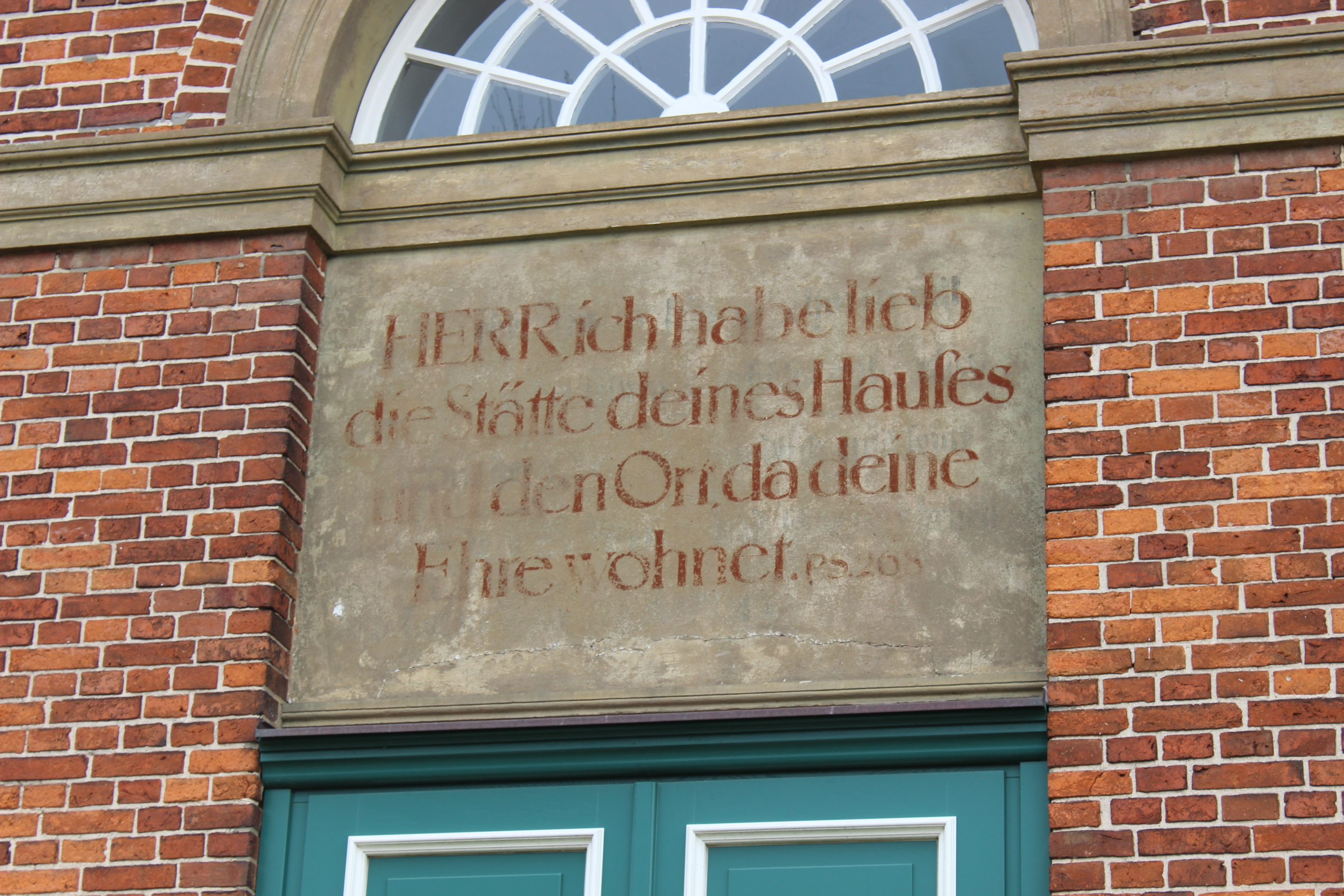 Psalm über der Kirchentür der St. Michaeliskirche (Bienenbüttel) Herr, ich habe lieb die Stätte deines Hauses und den Ort, da deine Ehre wohnet.